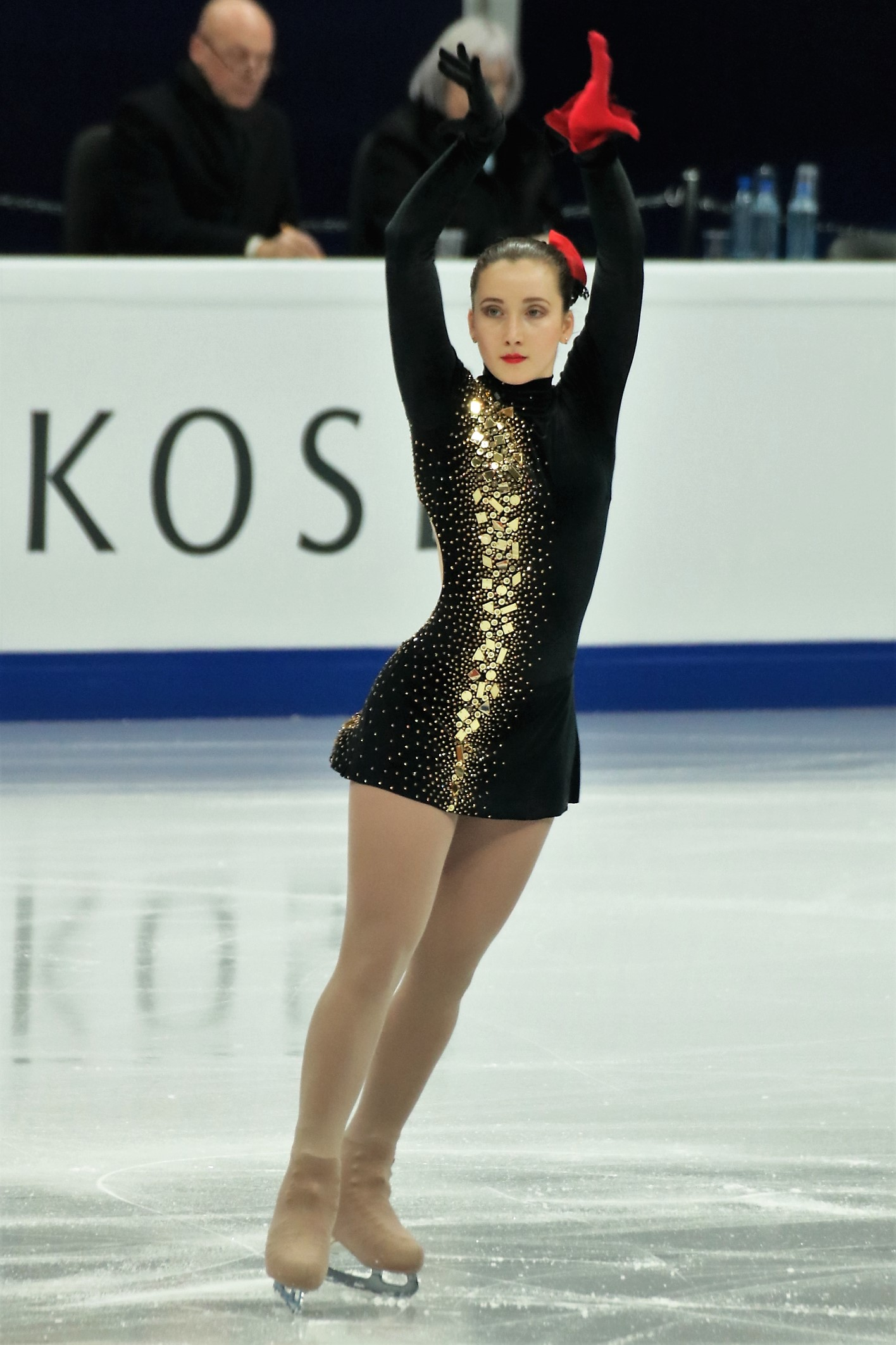 Анна Хныченкова (Украина) на Чемпионате Европы по фигурному катанию 2018.